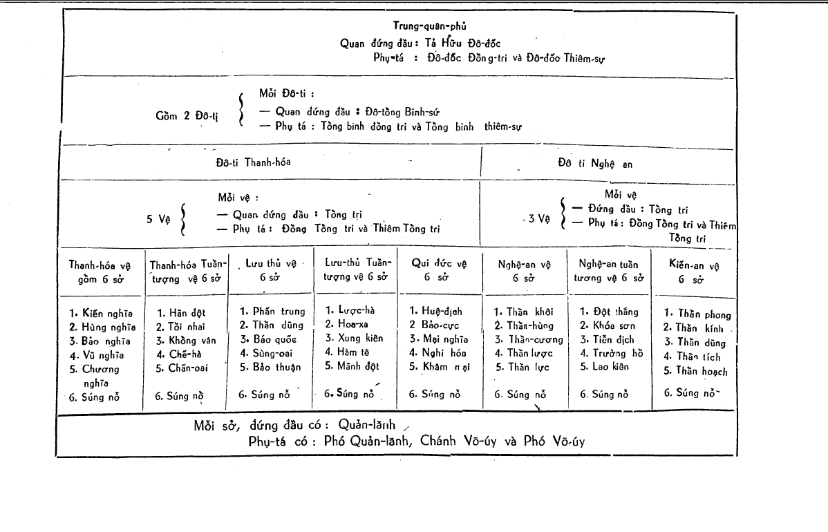 Trung quân phủ thời Lê Thánh Tông với hai xứ Thanh Hoa và Nghệ An dưới sự điều hành quân sự từ phủ. Nguồn: Tổ chức chính quyền trung ương dưới triều Lê Thánh Tông. Tác giả Lê Kim Ngân, do Bộ Quốc Gia Giáo Dục xuất bản năm 1963